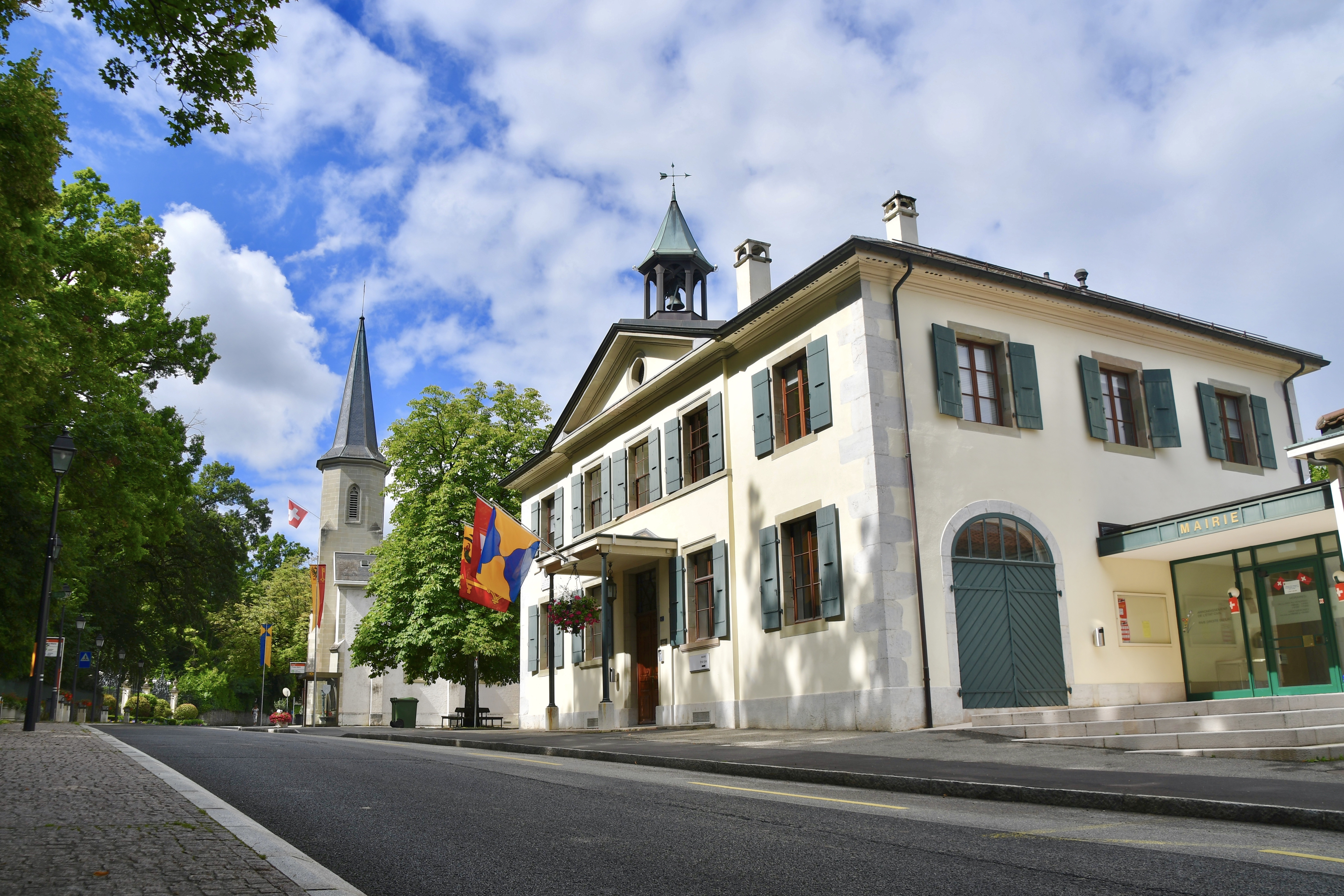 La mairie et l'église de Pregny-Chambésy, village de la campagne genevoise.